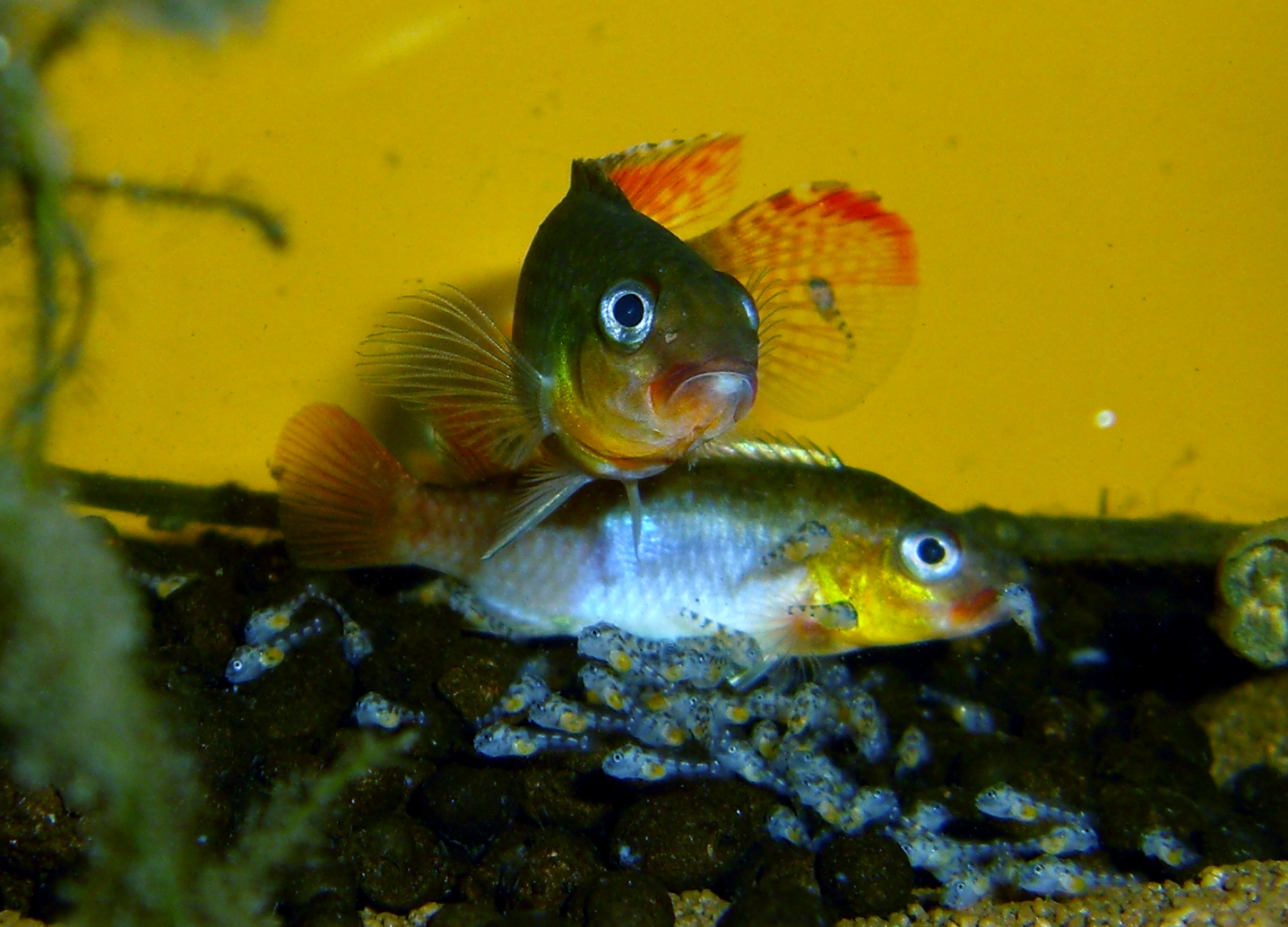 Pärchen mit Jungbrut von Congochromis sabinae "Tshuapa".